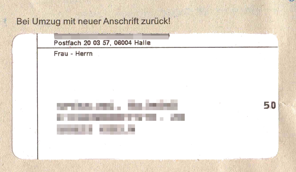 Ausschnitt Briefumschlag mit Vorausverfügung: Bei Umzug mit neuer Anschrift zurück